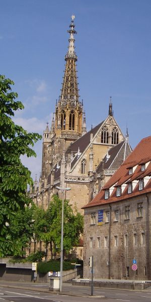 Esslingen am Neckar - Frauenkirche Fotografiert: selbst